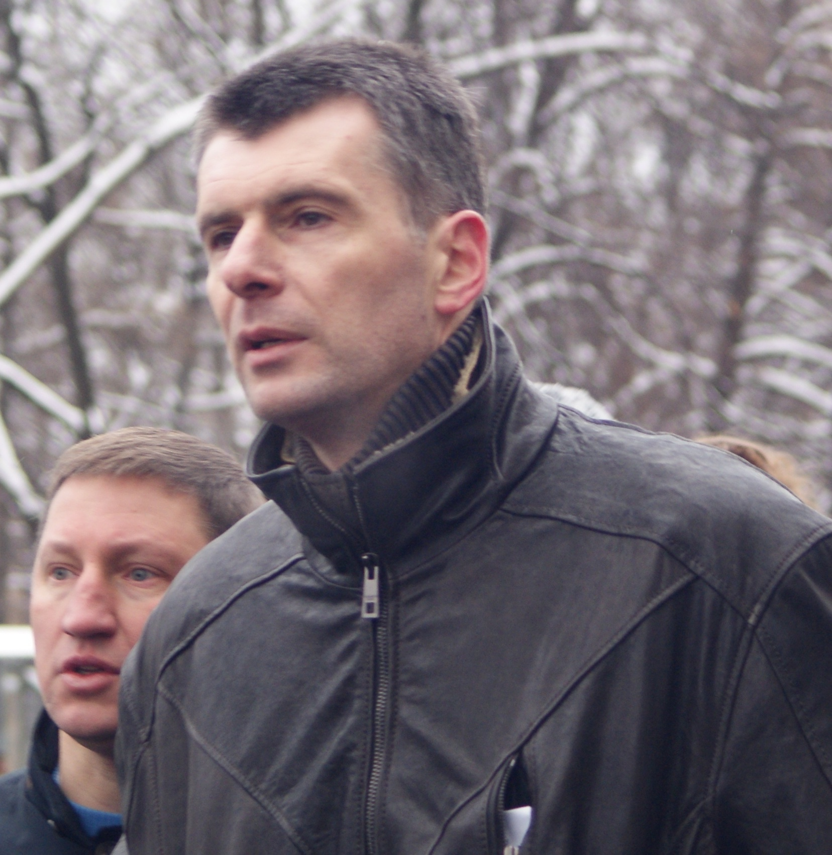 Mikhail Prokhorov